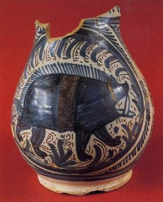 Museo dell'opera del duomo, prato, resti ceramici